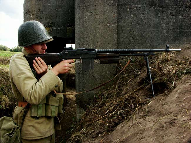 Ręczny karabin maszynowy wz.28 "Browning" na pozycji. Celowniczy w standardowym mundurze żołnierza piechoty z 1939 roku. Rekonstrukcja historyczna - stowarzyszenie "Strzelcy Kaniowscy", Łódź. Copyright: Bolek Rosiński 2007